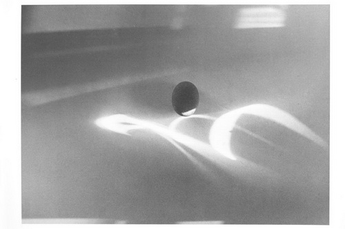 František Provazník´s photograph. Fotografie Františka Provazníka.